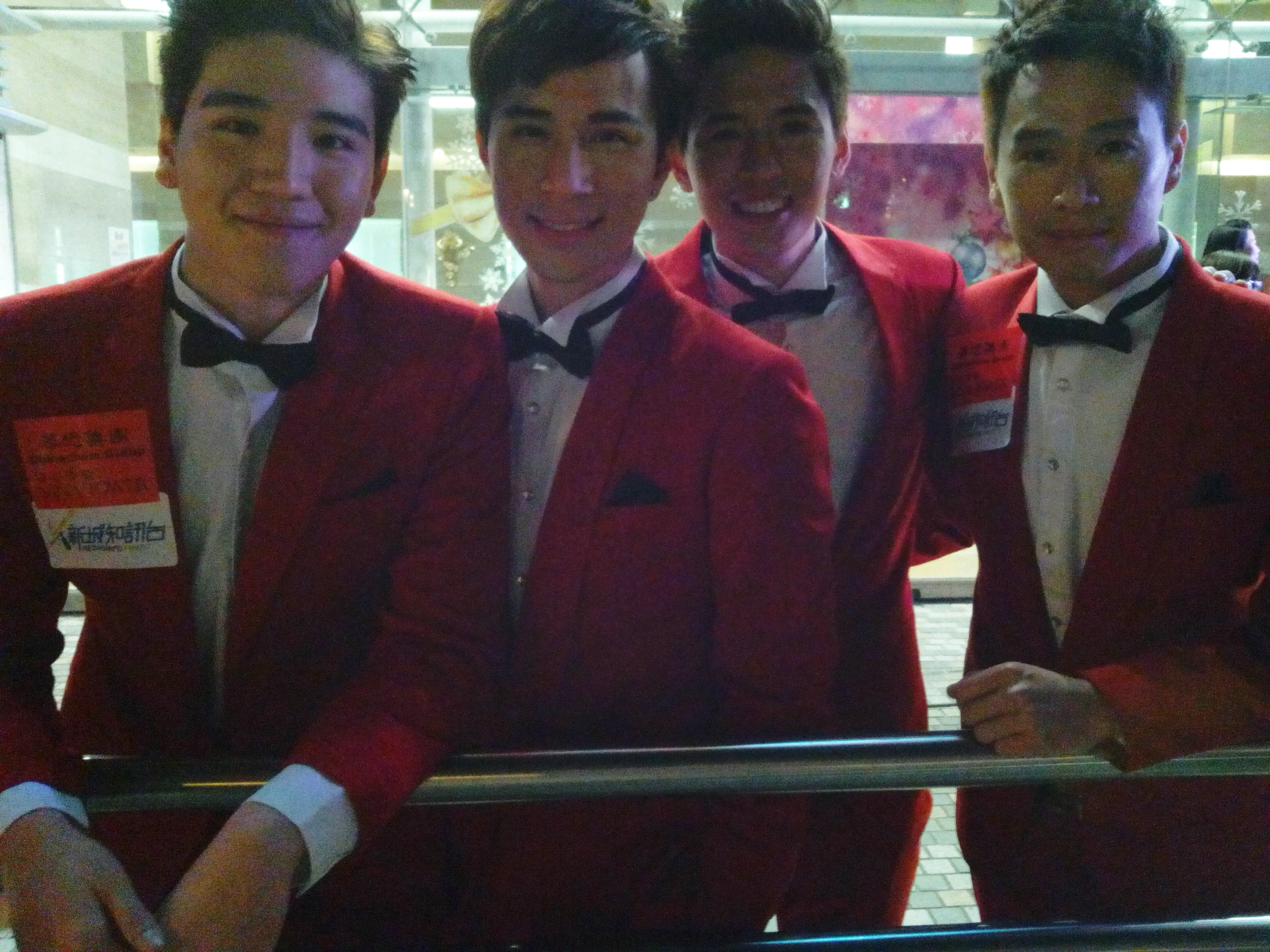 中文（香港）: 香港男子組合Gentlemen的樣子